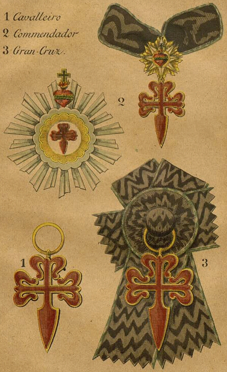 Brazylijski Cesarski Order Świętego Jakuba od Miecza